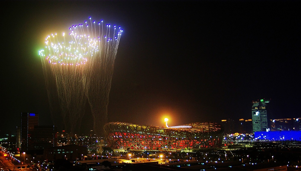 北京奥运会开幕式烟花